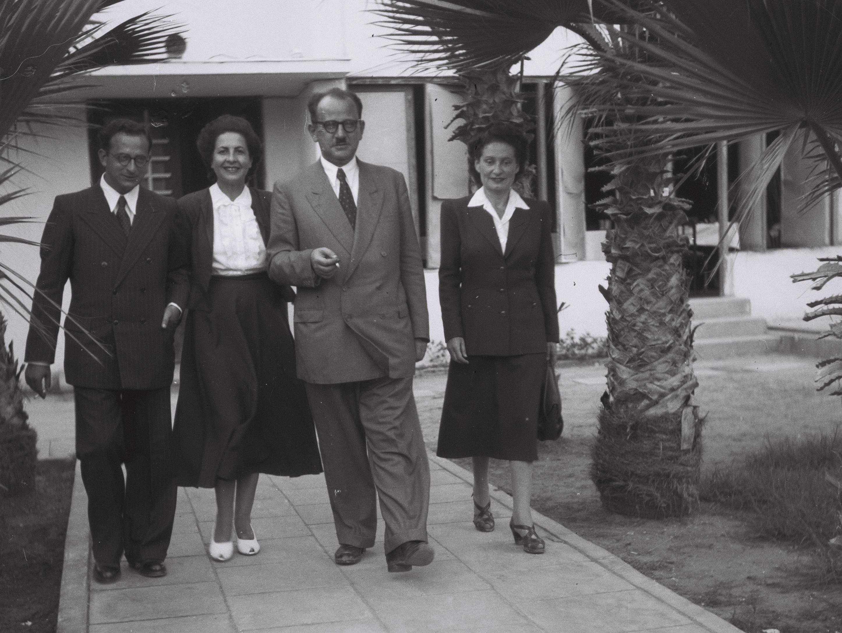 המשלחת הדיפלומטית של ישראל לאורוגואי, משמאל לימין, יצחק נבון מזכיר שני, הגב' צור ומר יעקב צור ראש המשלחת, הגב' יהודית ברגמן מזכיר ראשון